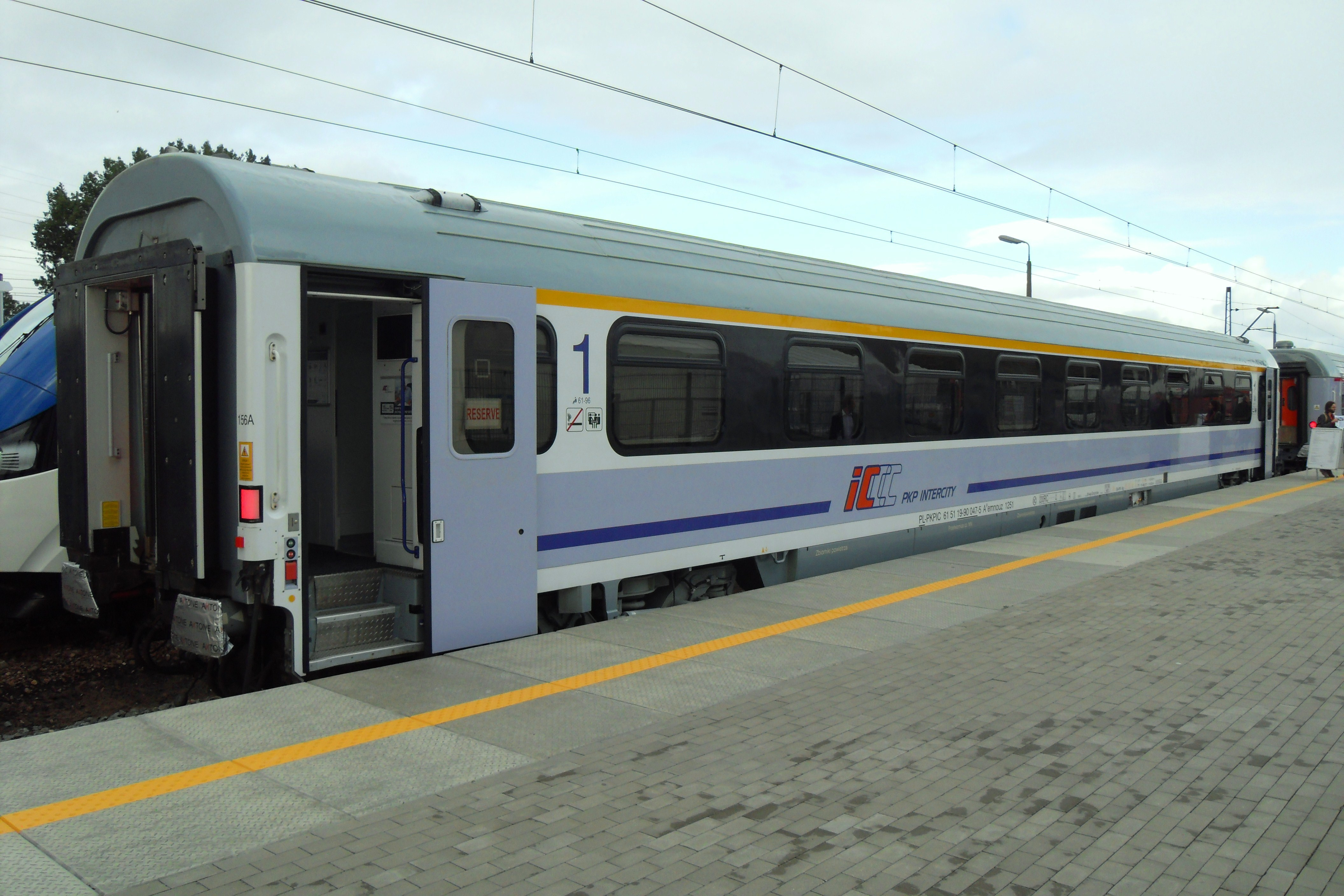 Gdańsk Letnica. TRAKO 2013, wagon 156A (H. Cegielski).